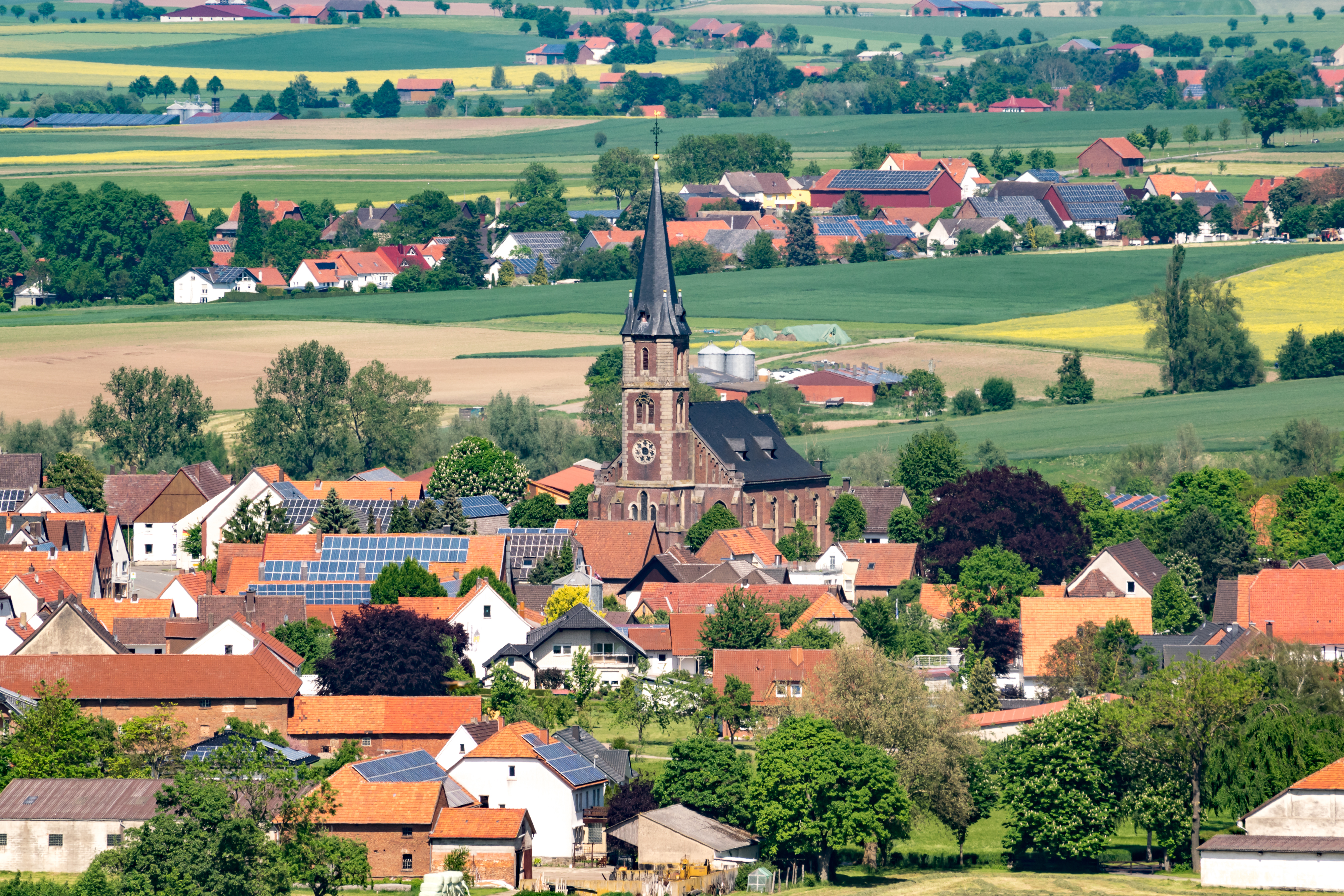 Blick vom Desenberg Richtung Daseburg